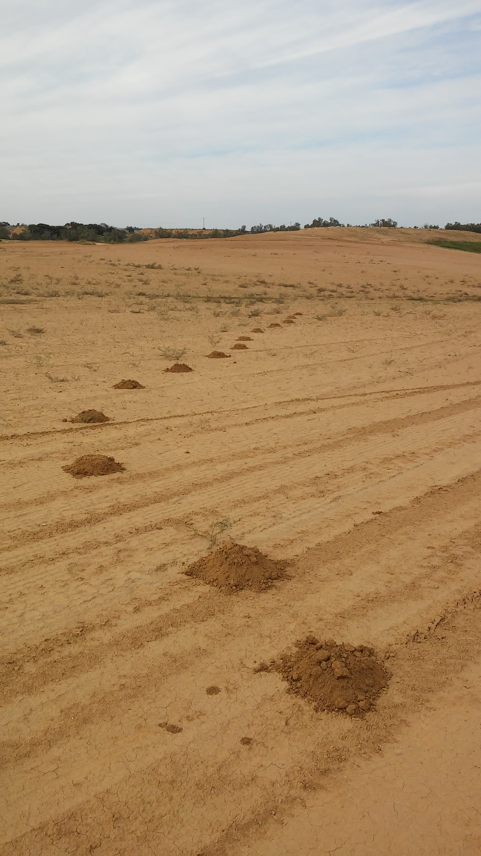 תלוליות של חולד ארצישראלי ממזרח לגן לאומי אשכול בנגב המערבי